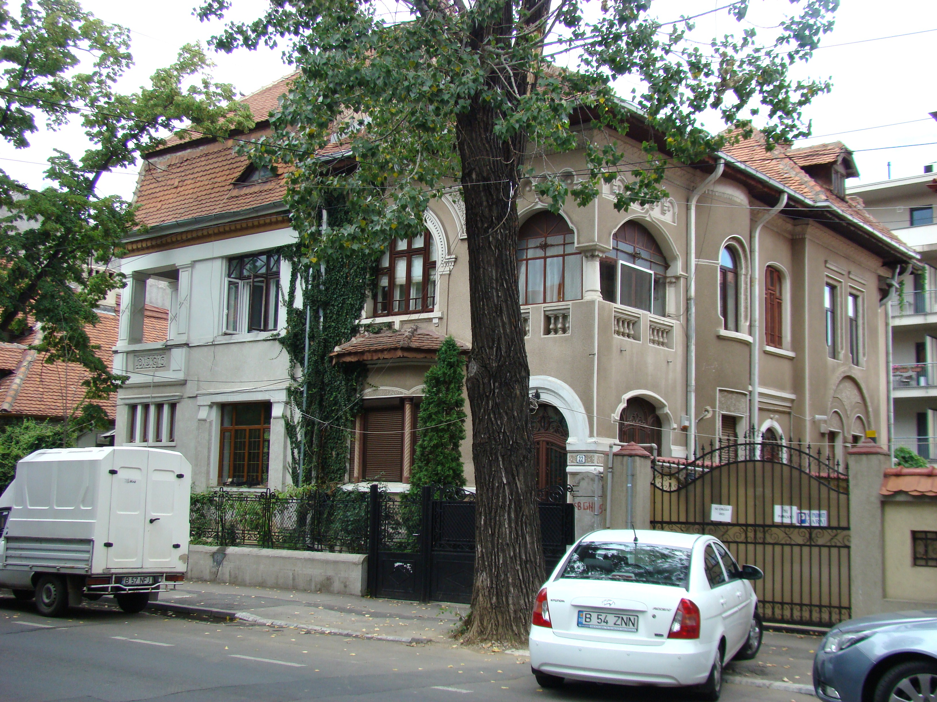 Casă monument istoric, str. Roma, nr. 22